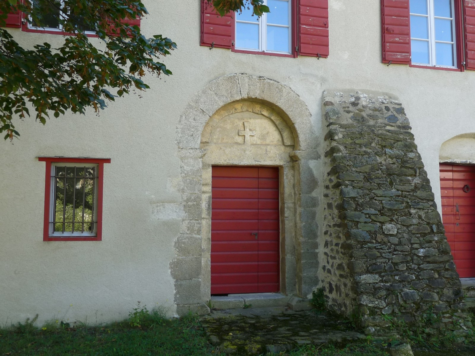 Presbytère, église Saint-Étienne d'Urbanya, Pyrénées-Orientales, France